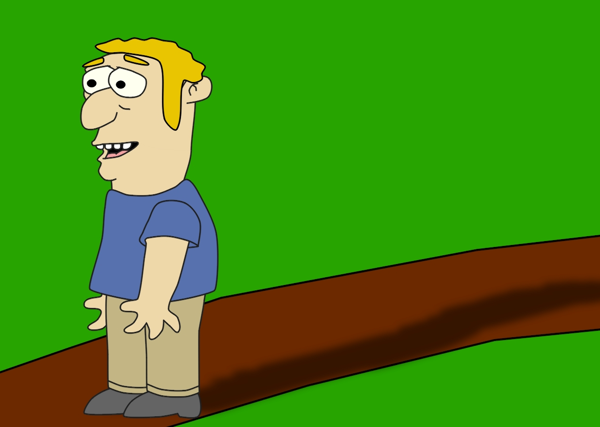 Beispiel für den dreidimensionalen Schatten einer Person, erstellt mit Anime Studio.